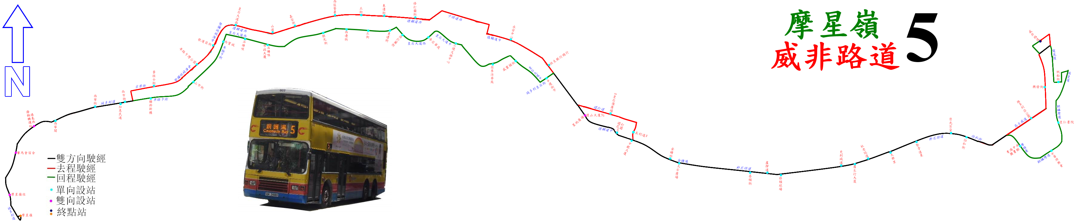 中文（香港）: 城巴5號線的走線圖